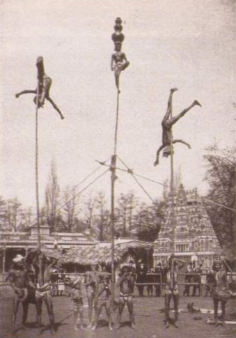 Artistengruppe „Les Malabares“, „Völkerschau“ im Tiergarten Nill, um 1900.